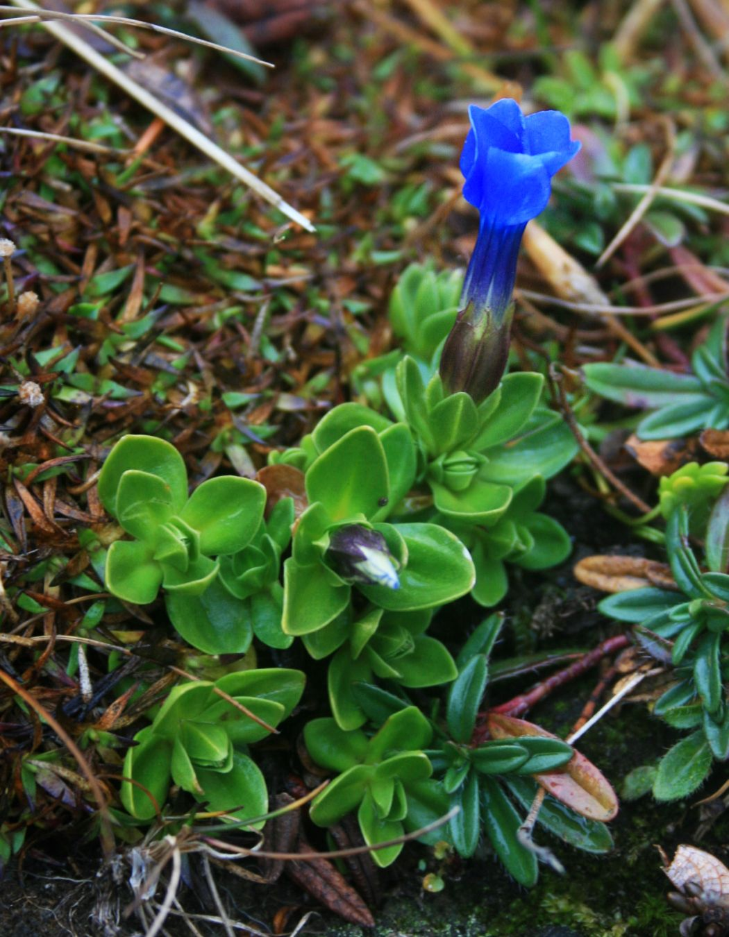 Rundblatt-Enzian (Gentiana orbicularis), Enziangewächse (Gentianaceae) - Italien/Italia/Italy: Trentino-Alto Adige/Südtirol, Prov. Bolzano/Bozen, Zirogalm NE Gossensass/Colle Isarco, nordwestlich unter der Kalkwandstange, 2000-2100 m s.m.